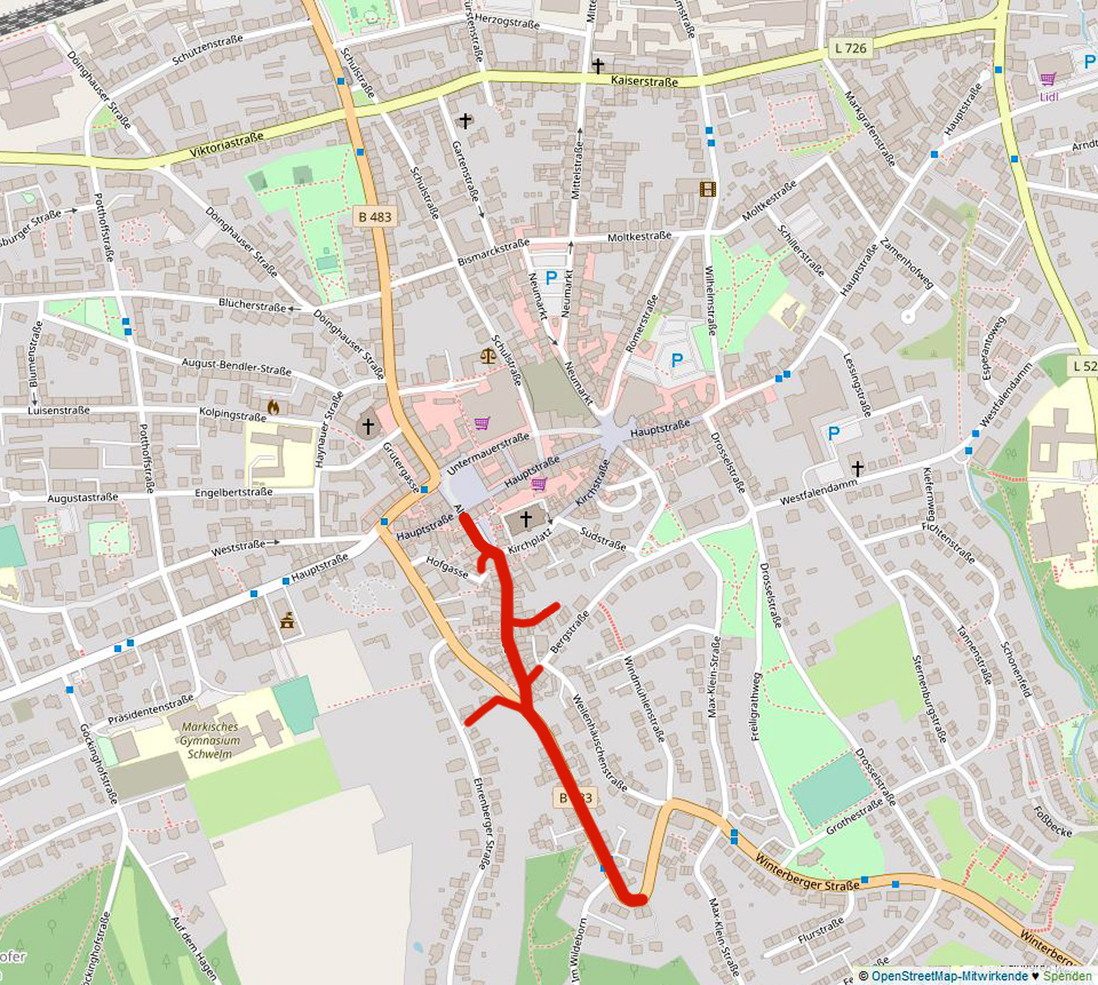 Lage von Bau- und Bodendenkmälern in Schwelm, rot markiert ein Bereich vom Altmarkt südwärts mit den Denkmalorten: Altmarkt, Hofgasse, Kölner Straße, Leistraße, Bergstraße, Ehrenberger Straße. Kartenvorlage aus OpenStreetMap wurde um Markierung (rot) ergänzt.